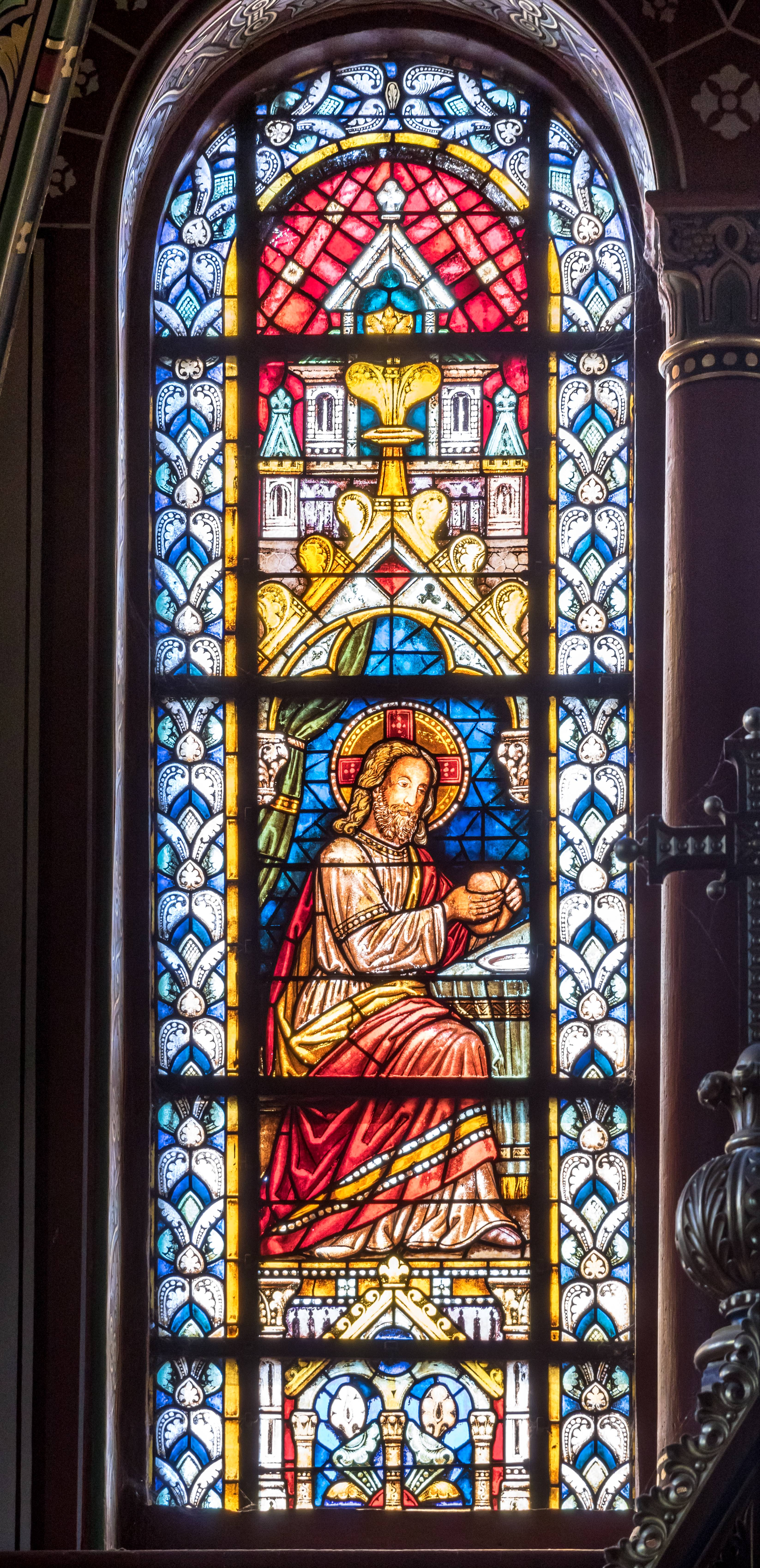 St. Peter und Paul in Bonndorf Die Glasfenster im Chor in der Kirche